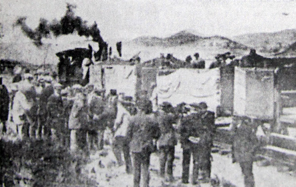 Tren inaugural del FCR sobre los primeros kilómetros de vía, cerca de Comodoro Rivadavia